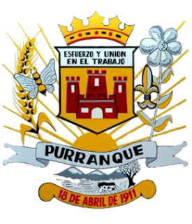 Escudo de la comuna de Purranque